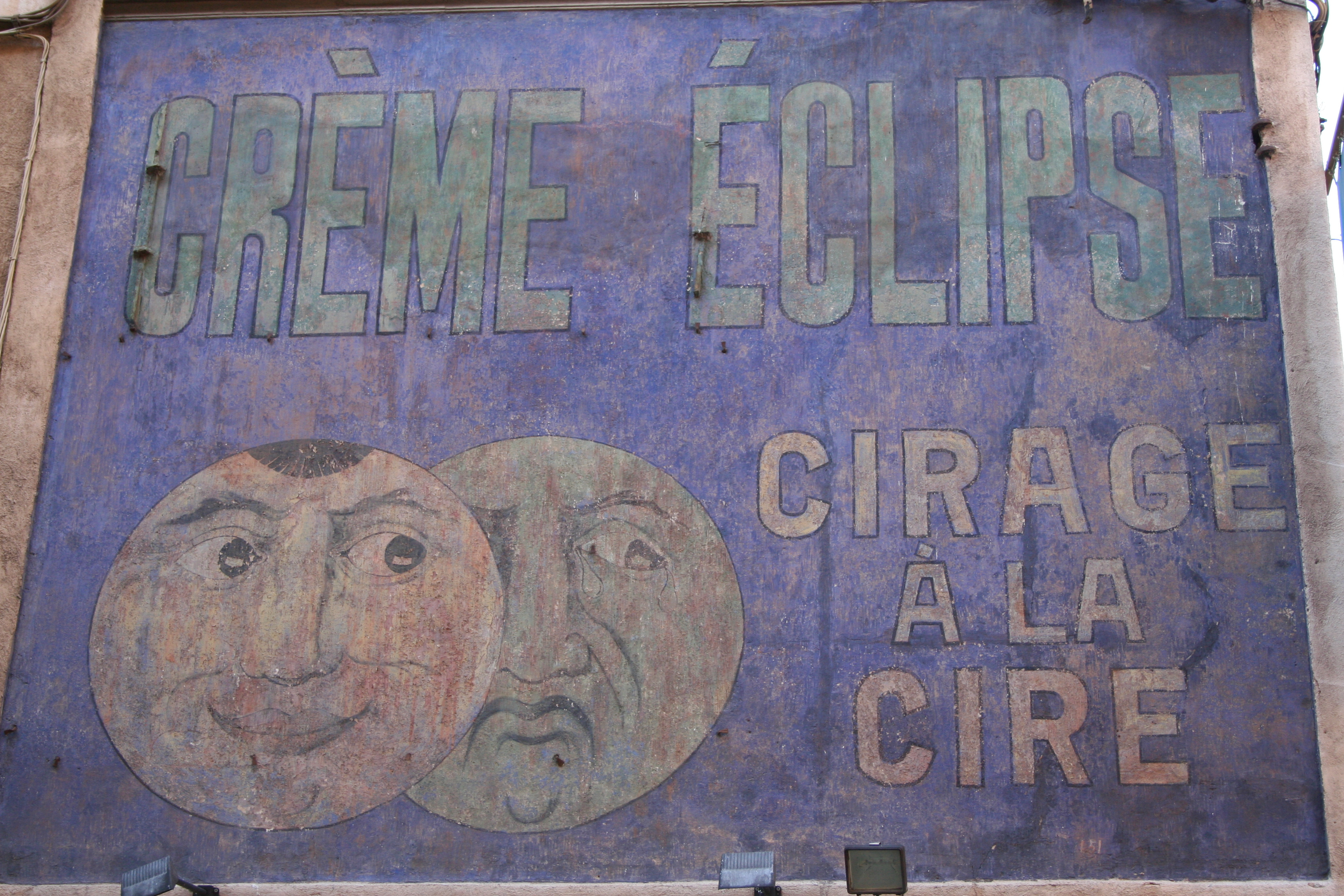 Publicité peinte, Aix-en-Provence (France).